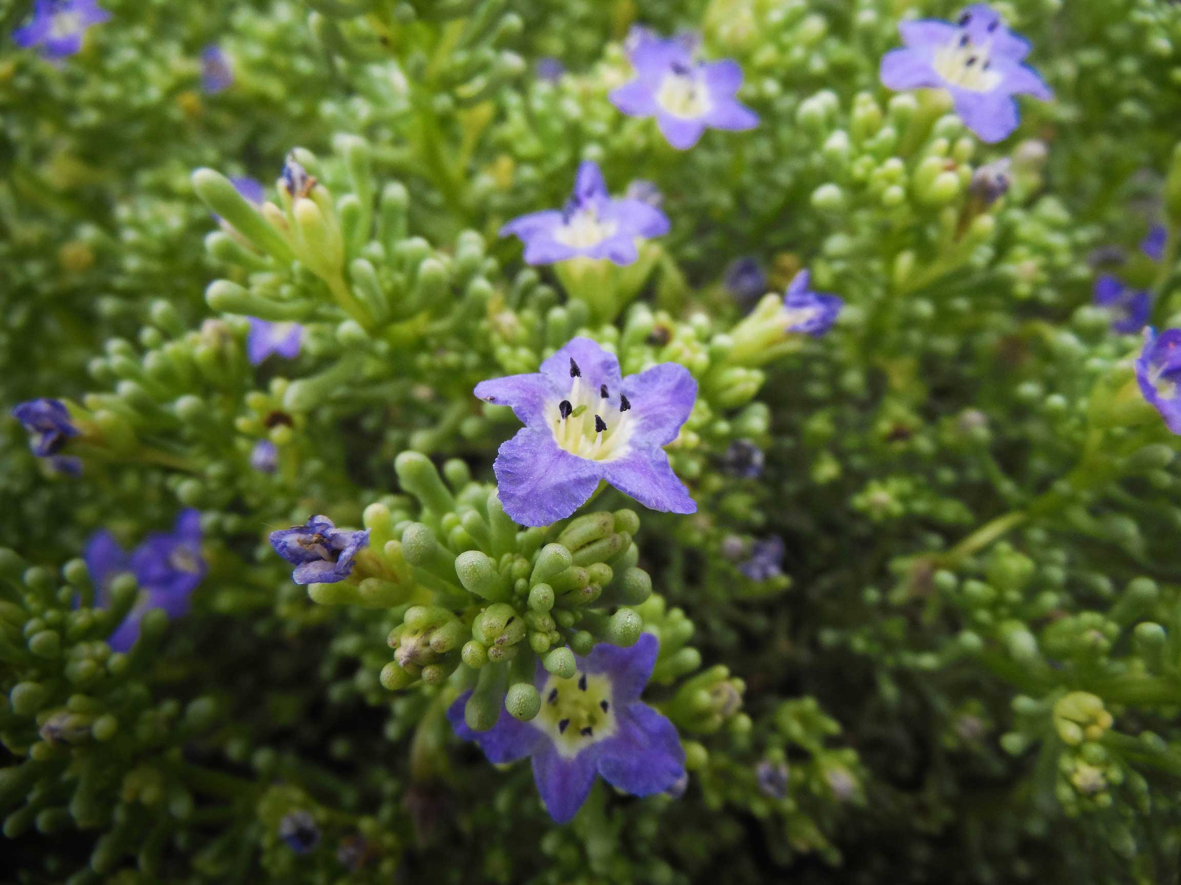 Suspiro (Nolana Divaricata). Parque nacional Llanos de Challe, Región de Atacama, Chile.